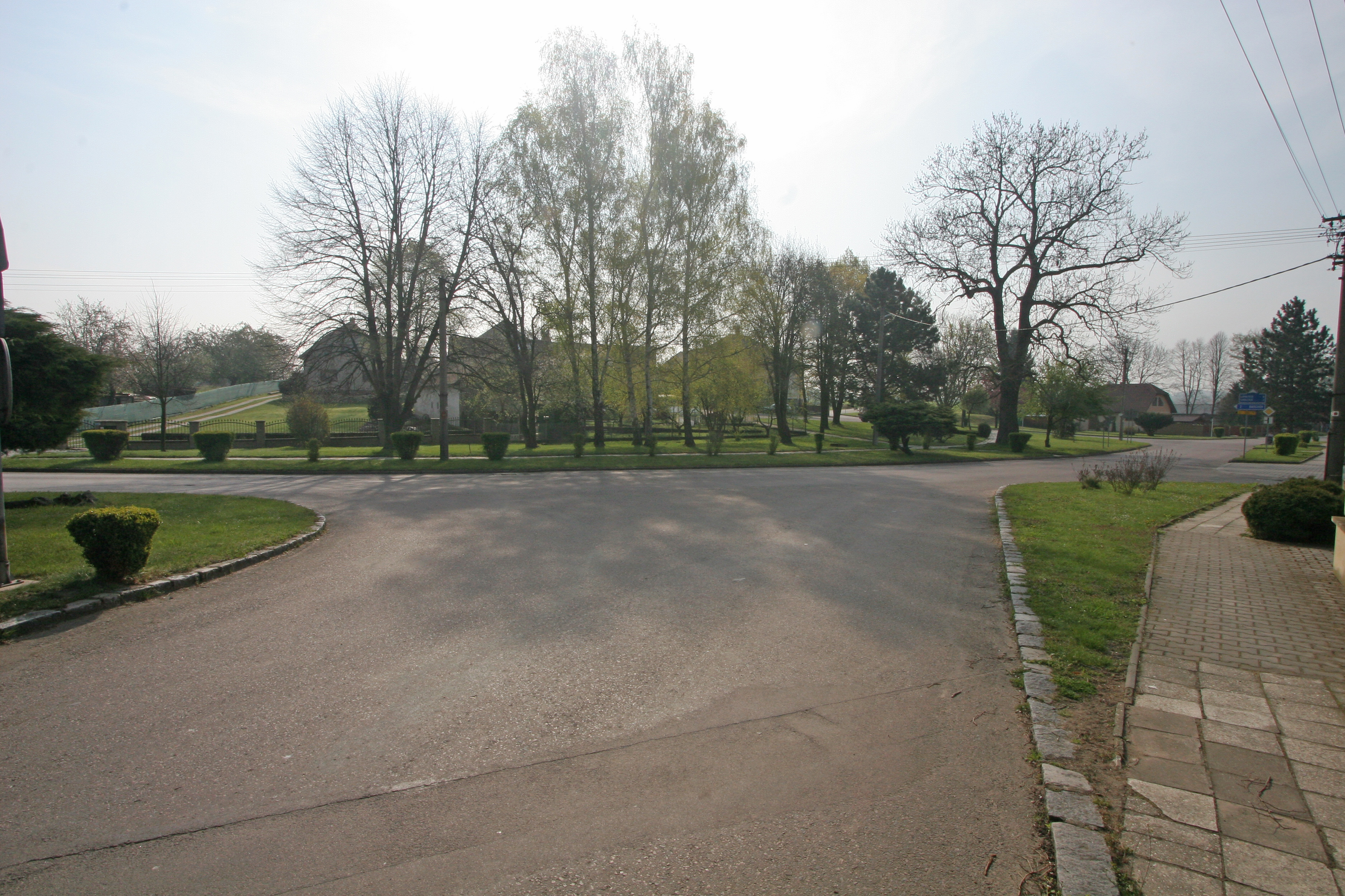 Bezděkov náves